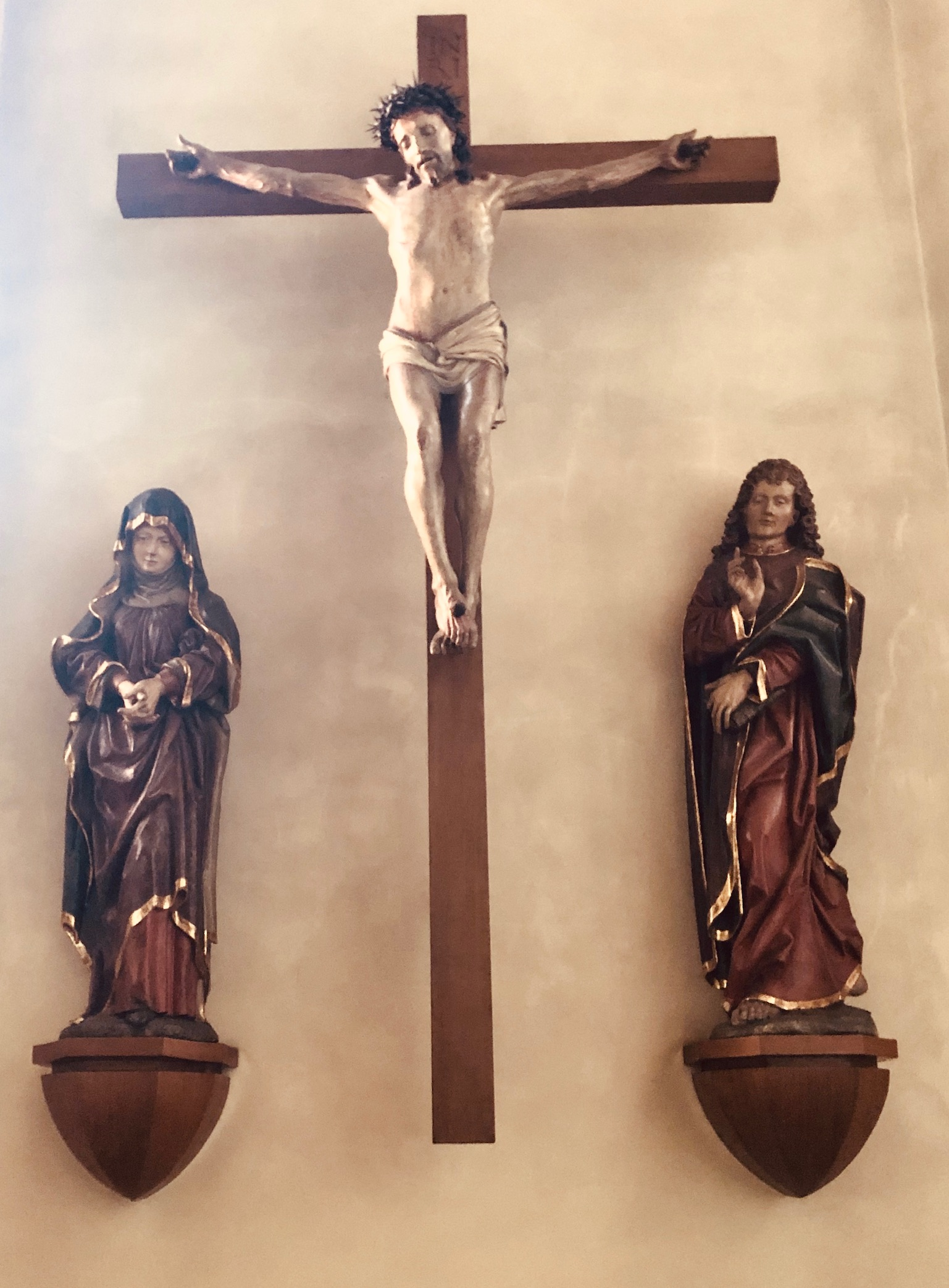 Kreuzigungsgruppe in der Kirche des ehemaligen Klosters Kalvarienberg in Ahrweiler, Rheinland-Pfalz, Deutschland